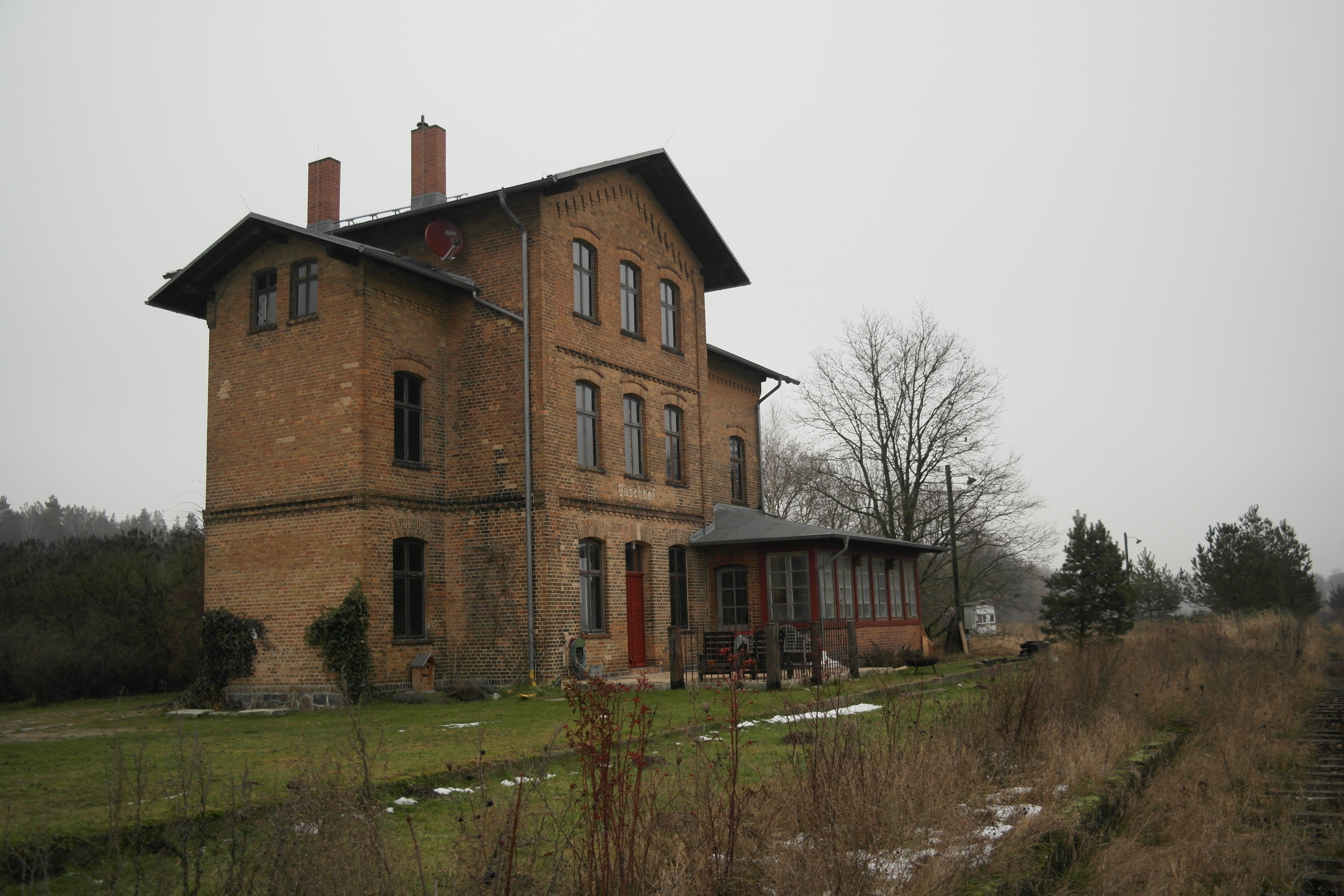 Bahnhof Buschhof, Blick von Südwesten